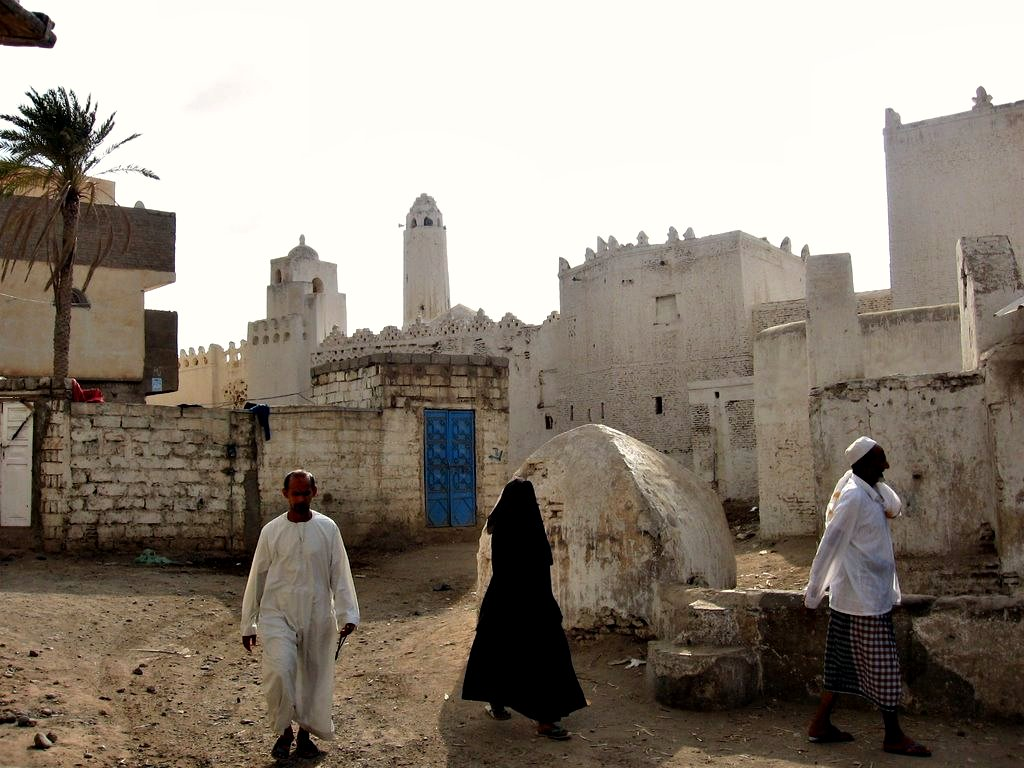 Zabid streets